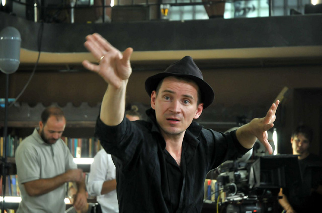 Hajdu Szabolcs magyar filmrendező, forgatókönyvíró, színész, a Bibliotheque Pascal forgatásán.